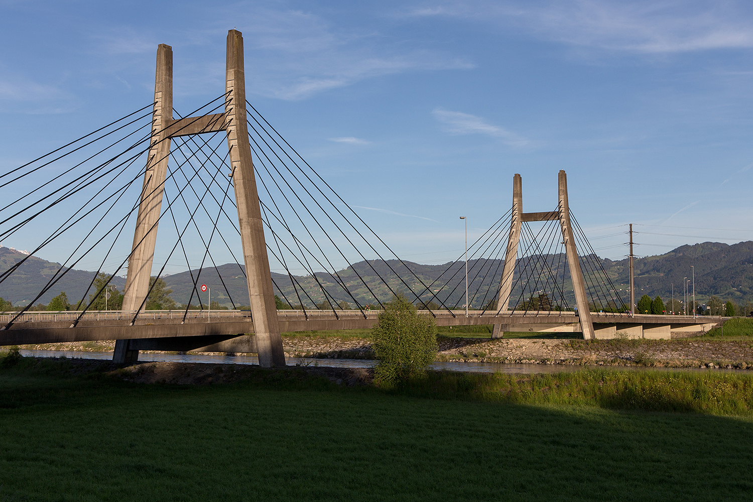 Die Schrägseilbrücke über dem neuen Rhein in Diepoldsau im Rheintal (SG)